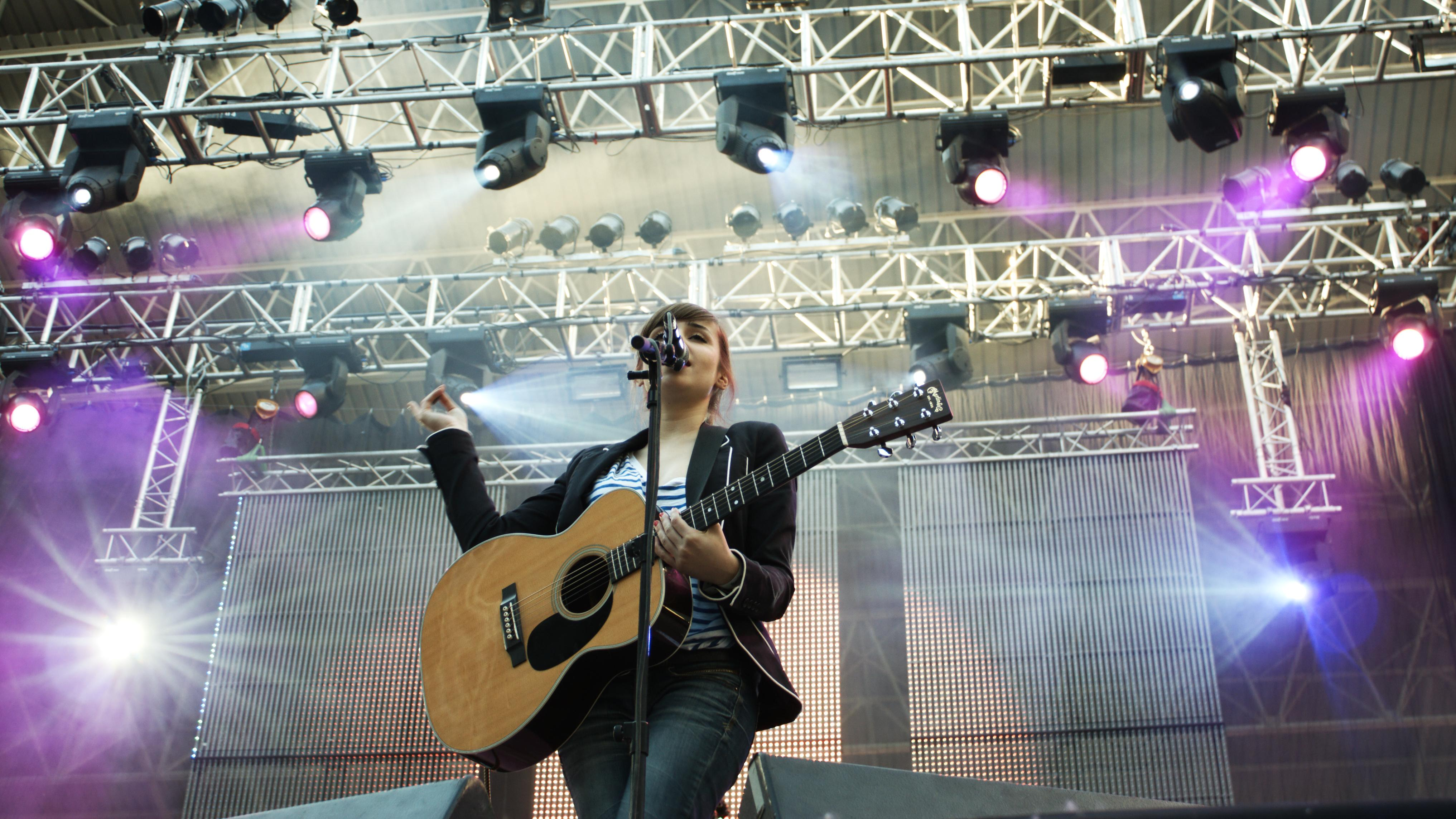 Atarfe (Granada), Coliseo. 17/05/2010